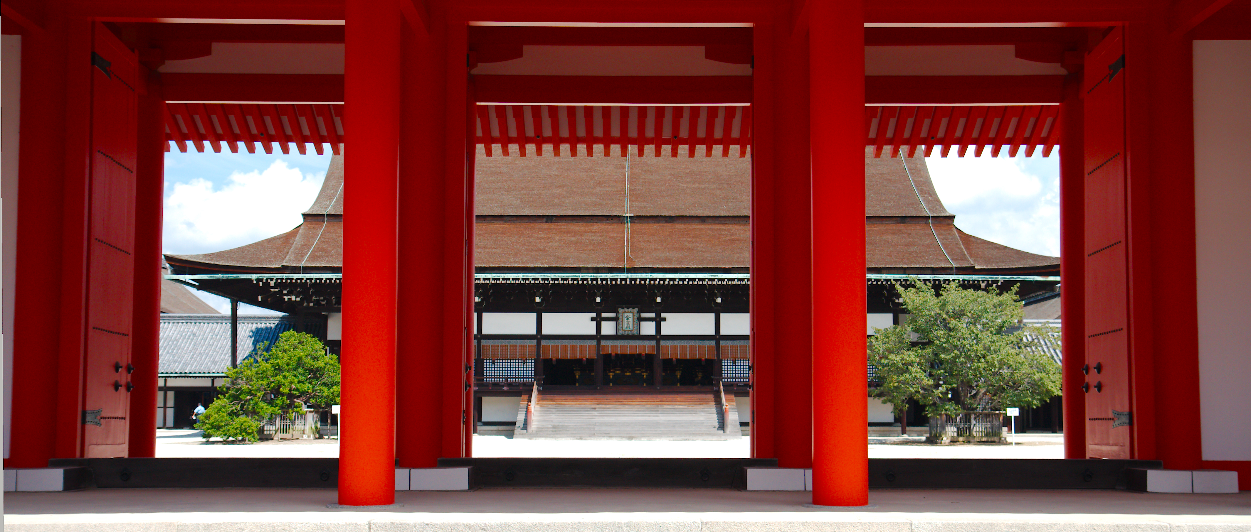 Imperial Palace